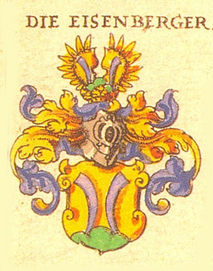 Wappen der Frankfurter Patrizierfamilie Eisenberger